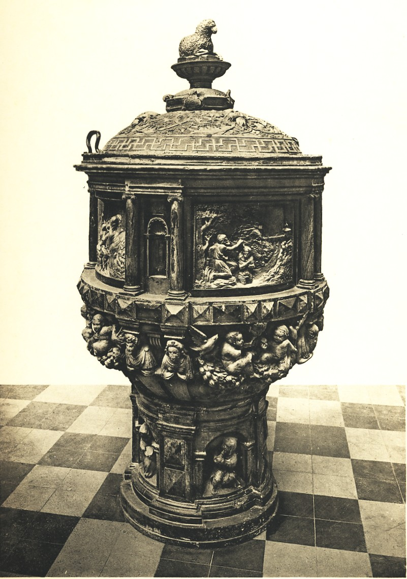 Taufstein der Schlosskapelle in Dresden, später in der Sophienkirche aufgestellt